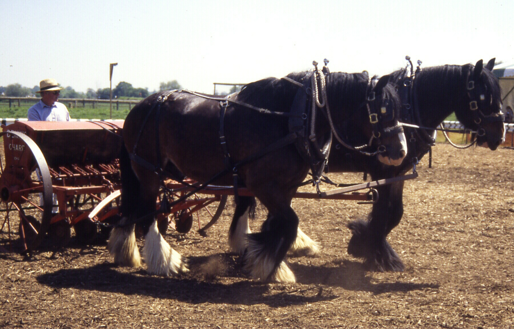 Shire Horses